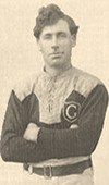 le joueur de rugby à XIII Chris McKivat